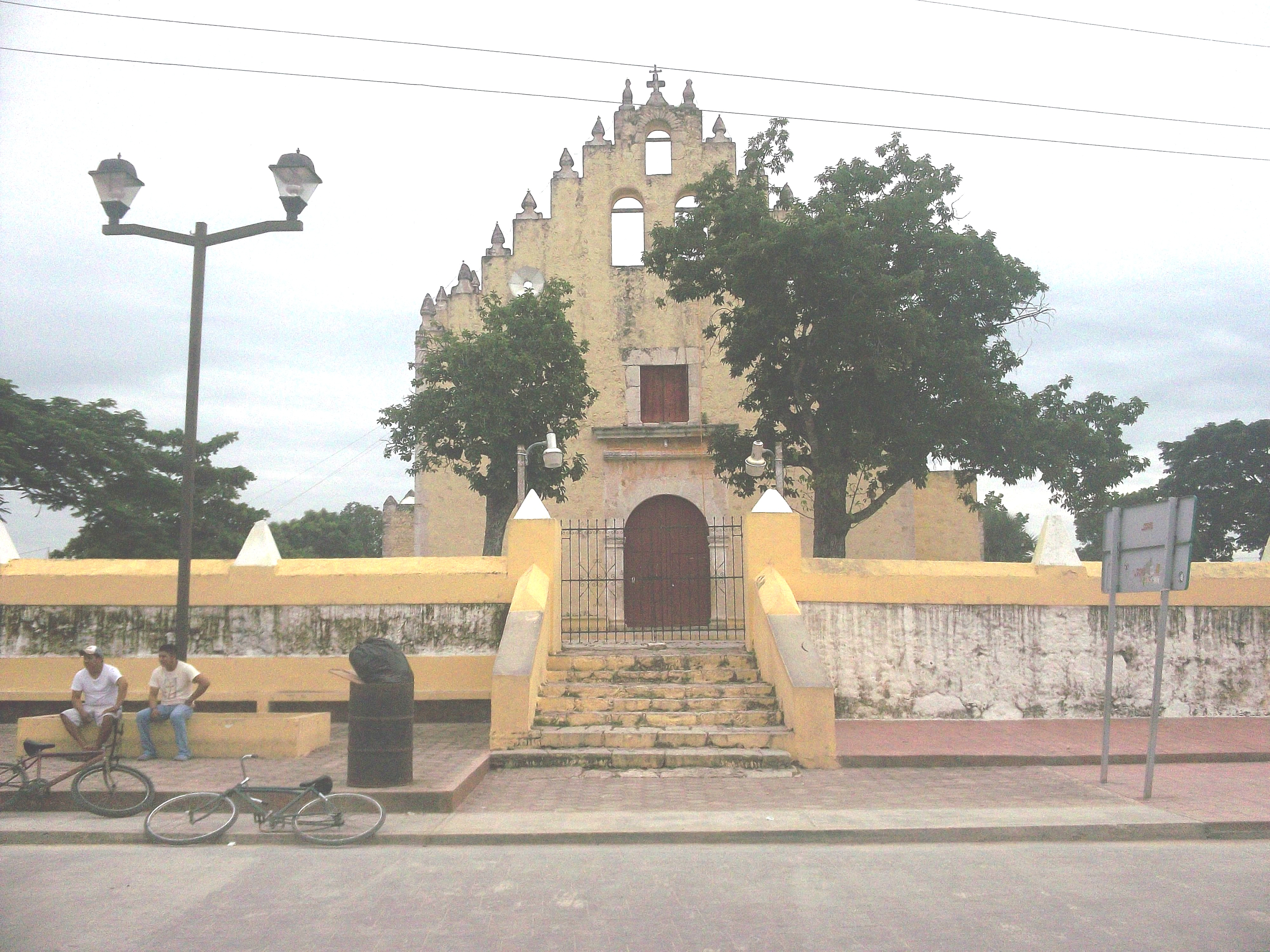 Iglesia de Cuzamá, Yucatán.